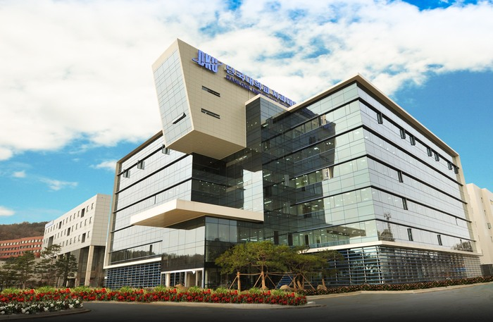 단국대학교 치대병원 전경(천안)